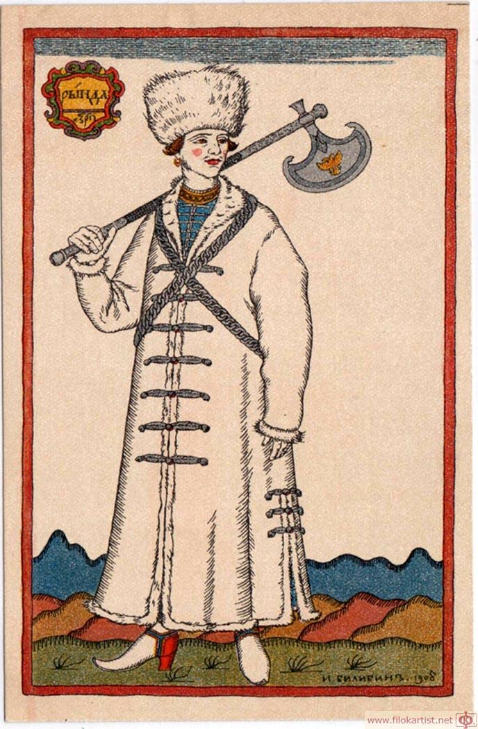 Костюм для оперы "Борис Годунов" Мусоргского в Парижской Большой Опере Билибин Иван Яковлевич Издание Общ. Св. Евгении